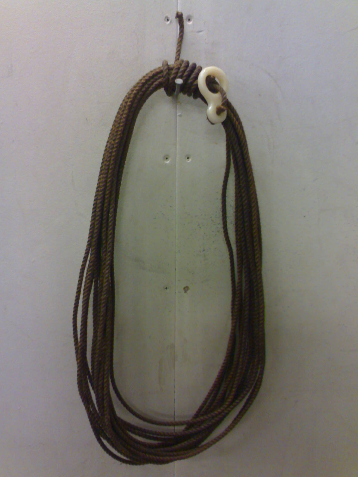 Suopunkivyyhti.